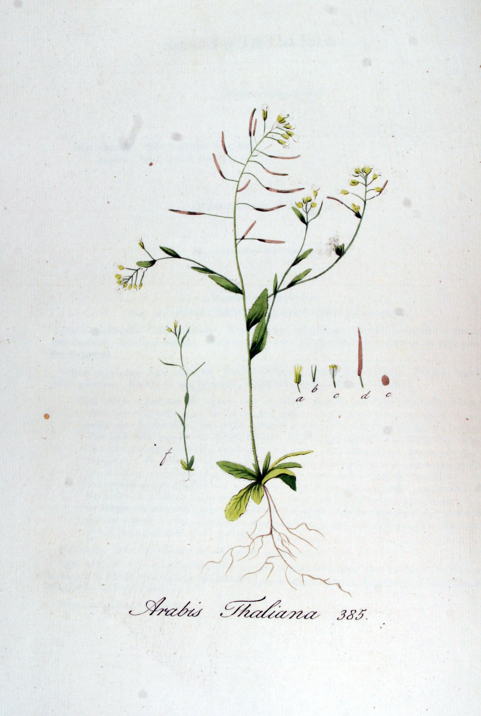 Arabidopsis thaliana (L.) Heynh., syn. Arabis thaliana L.